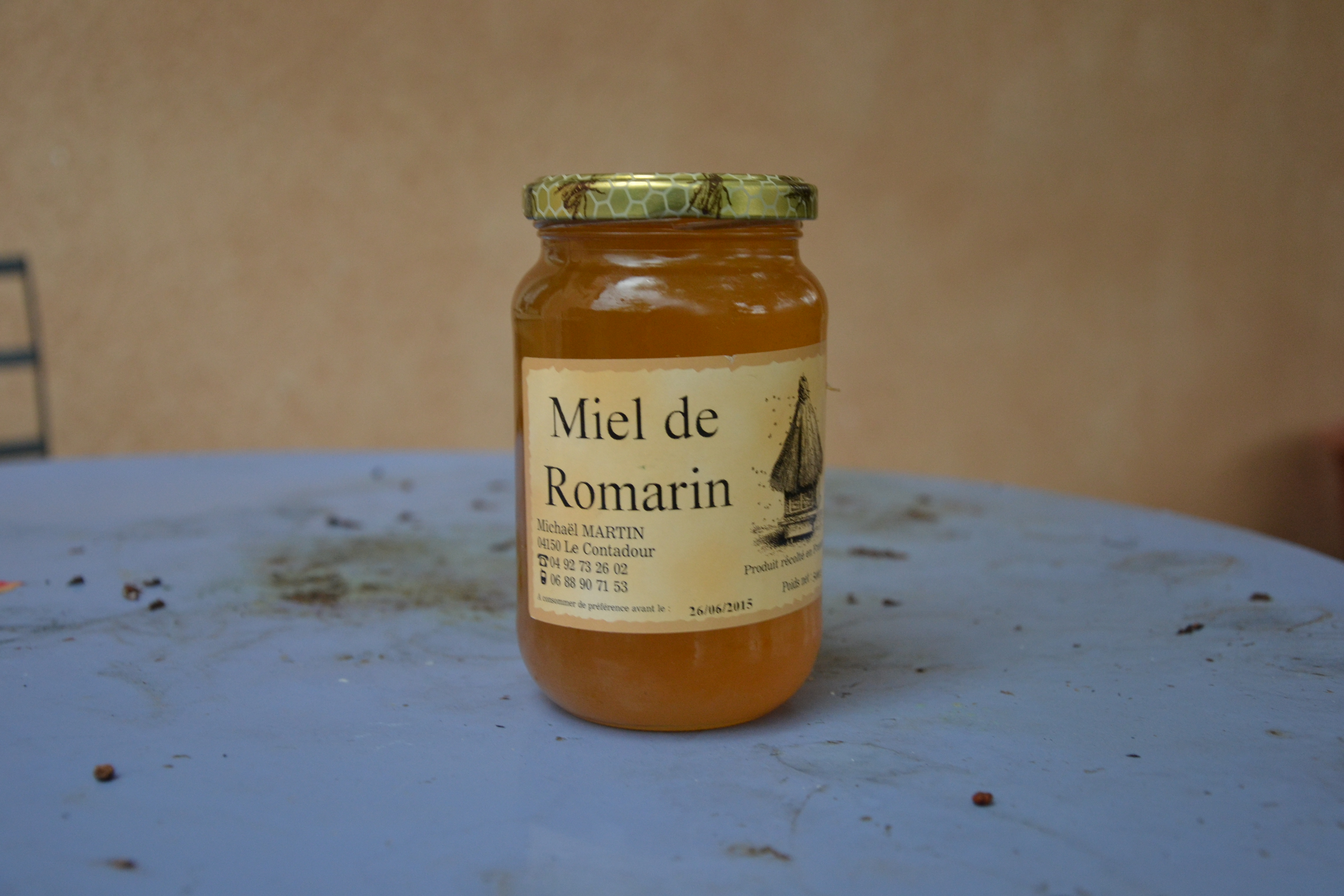 Miel du Contadour, commune du Redortiers